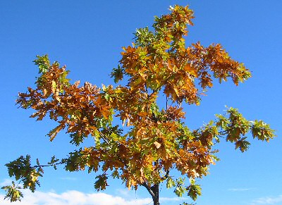 Feuilles d'un chêne chevelu en automne. Photo personnelle pris à Toulouse près de la Cité de l'Espace en octobre 2004.